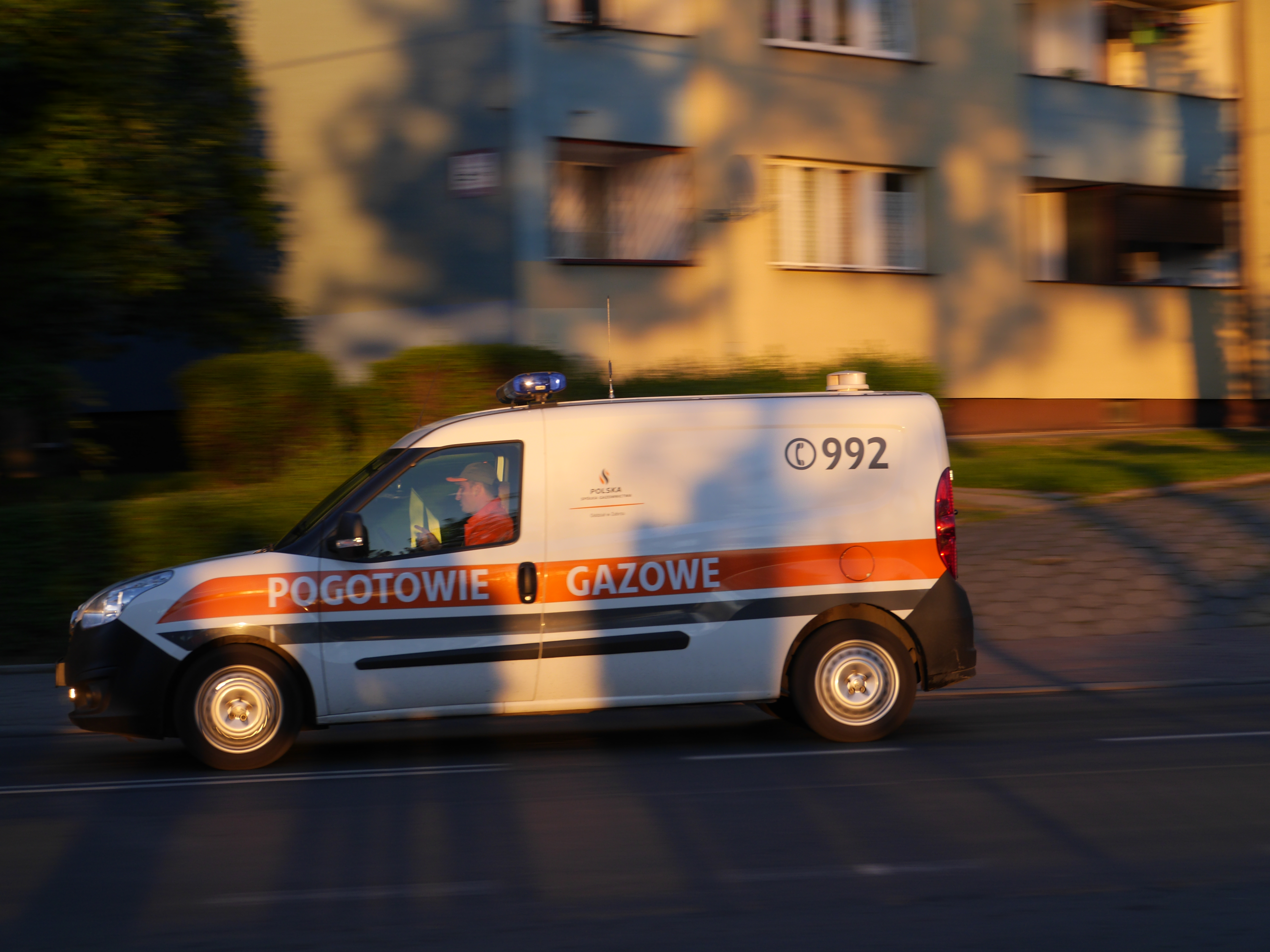 Pogotowie gazowe w Katowicach This photo was taken with Panasonic Lumix DMC-GH3 camera, thanks to Panasonic.You can see all photographs in category: Taken with Panasonic Lumix DMC-GH3.